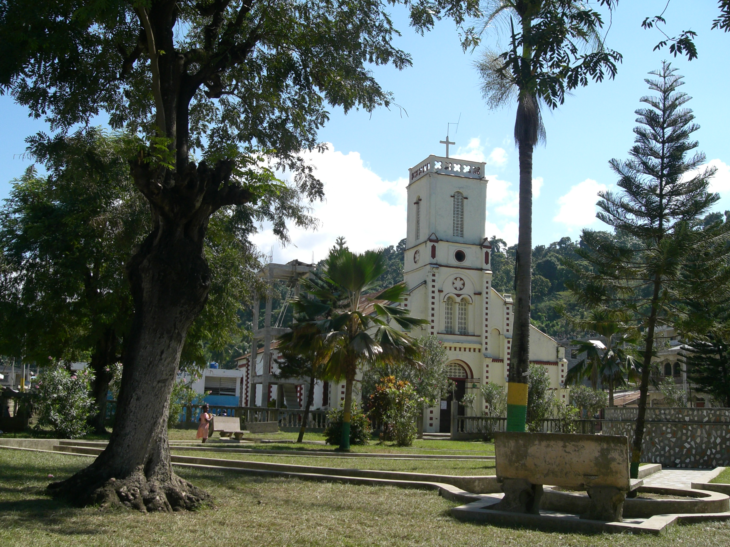 Anse d'Hainault, Haiti